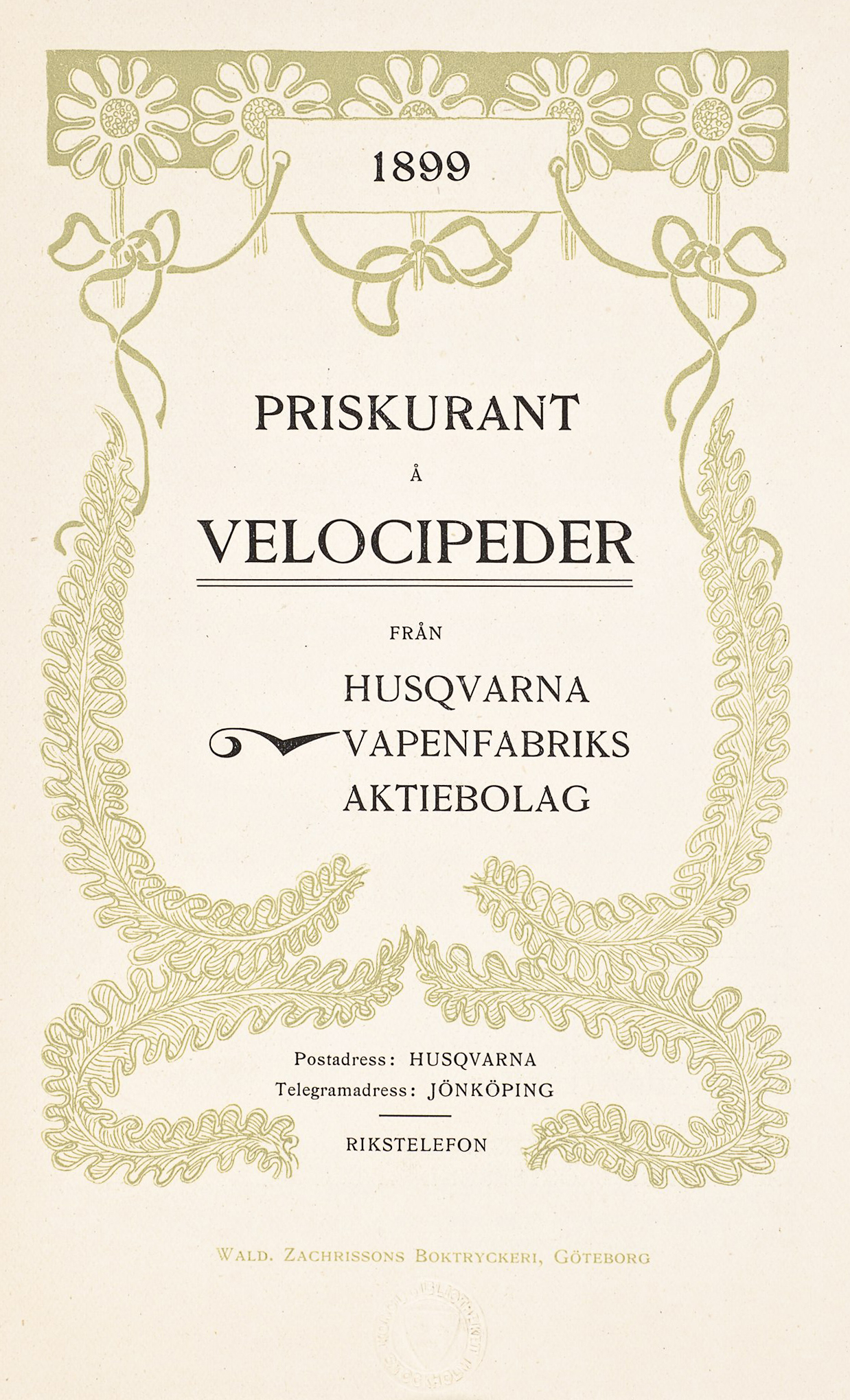 Husqvarna fabriks aktiebolag, Husqvarna 1885-1899 Ur Kungl. bibliotekets samlingar – [librisid: 14799957] Länk